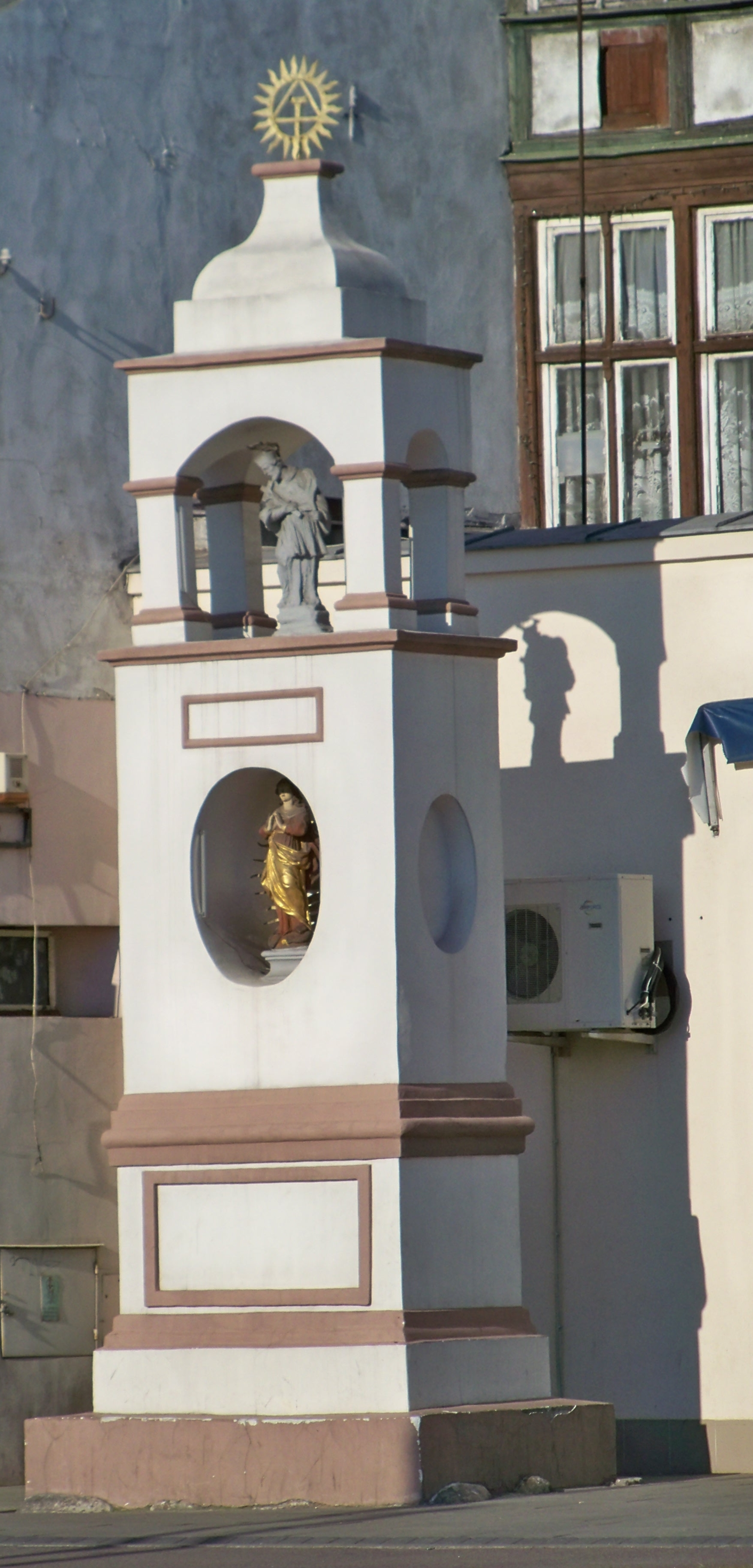 Kapliczka na al. Grunwaldzkiej w Gdańsku-Oliwie